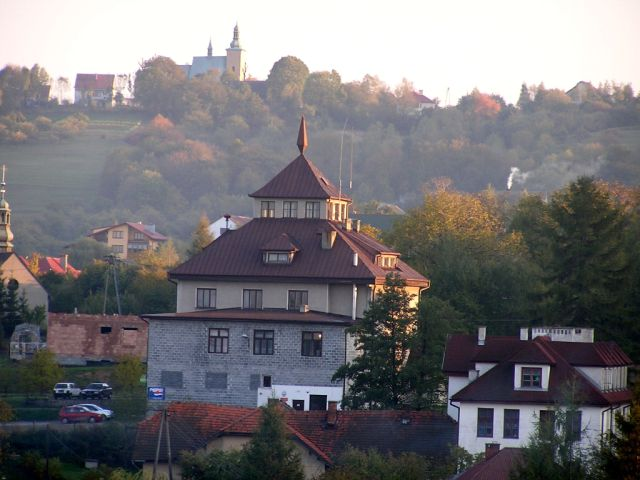 Trąbki – wieś w Polsce położona w województwie małopolskim, w powiecie wielickim, w gminie Biskupice.